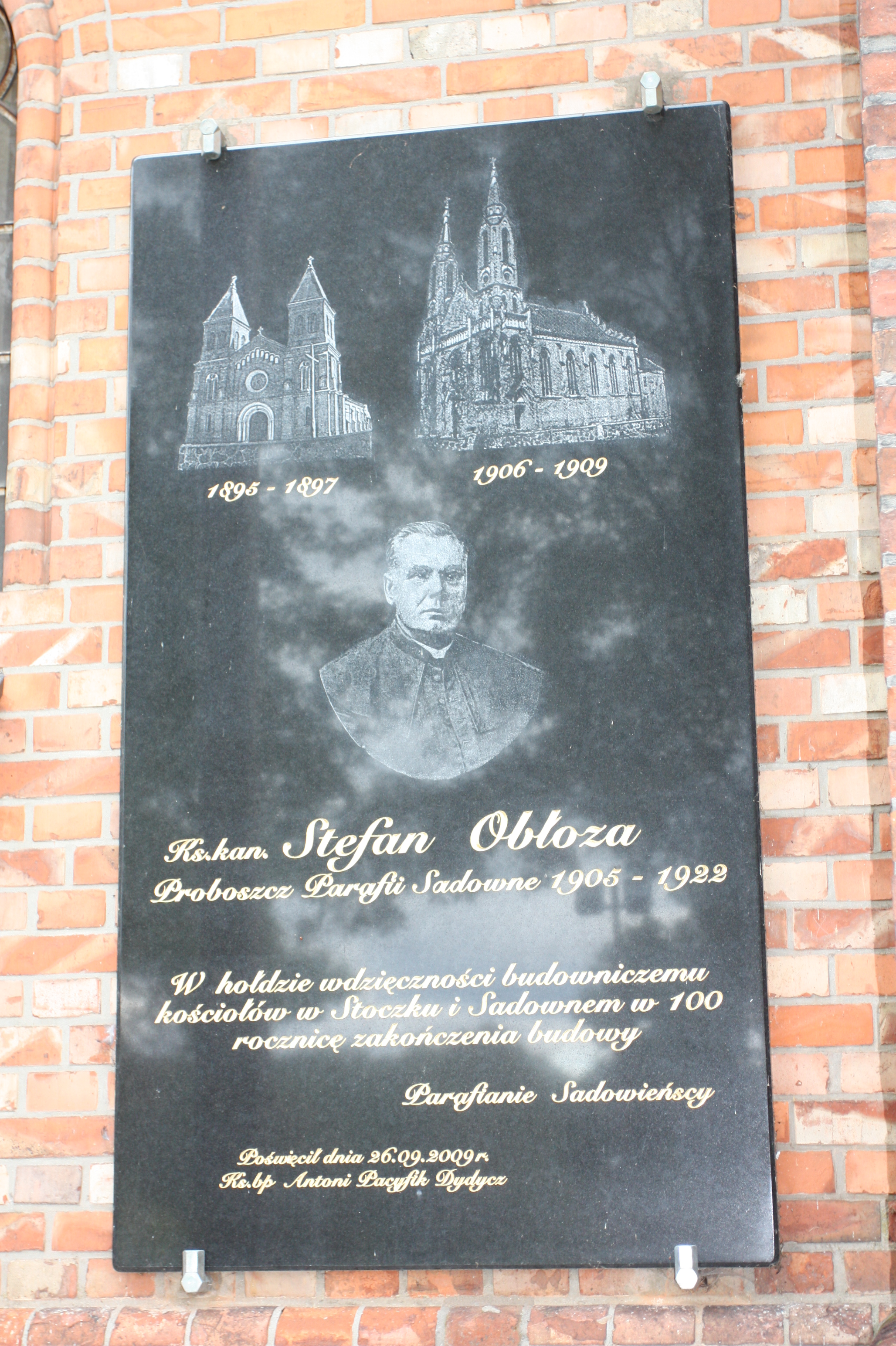 Sadowne, kościół par. pw. św. Jana Chrzciciela, 1906-1909, 1948-1950